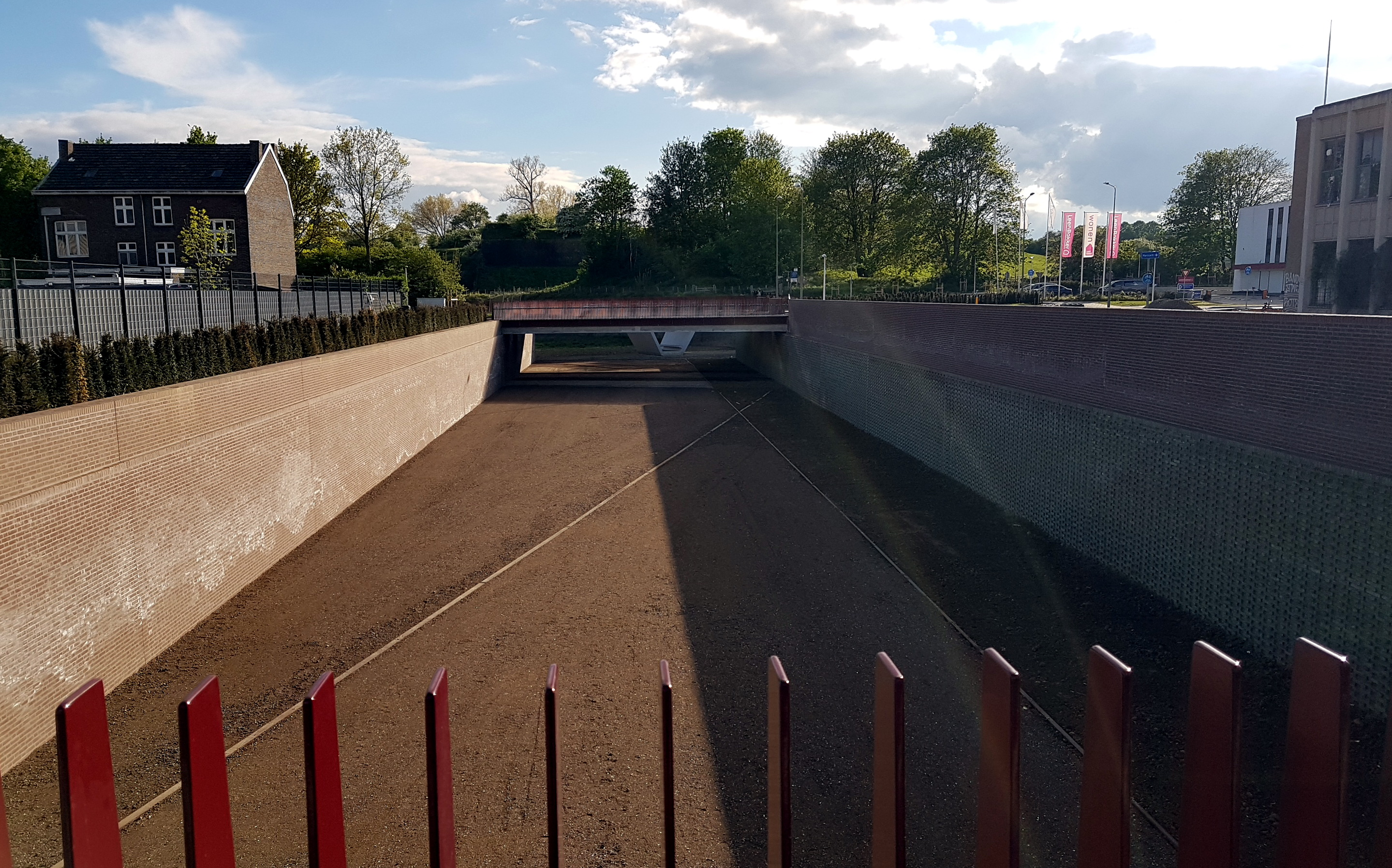 Zicht op een vijftal verkeers-, fiets- en voetgangersbruggen nabij de Cabergerweg in Maastricht. De bruggen zijn onderdeel van de nieuw aangelegde droge gracht tussen de Hoge en Lage Fronten (eigenlijk: Linie van Dumoulin en Nieuwe Bossche Fronten), die twee losse delen van het Frontenpark met elkaar verbindt.